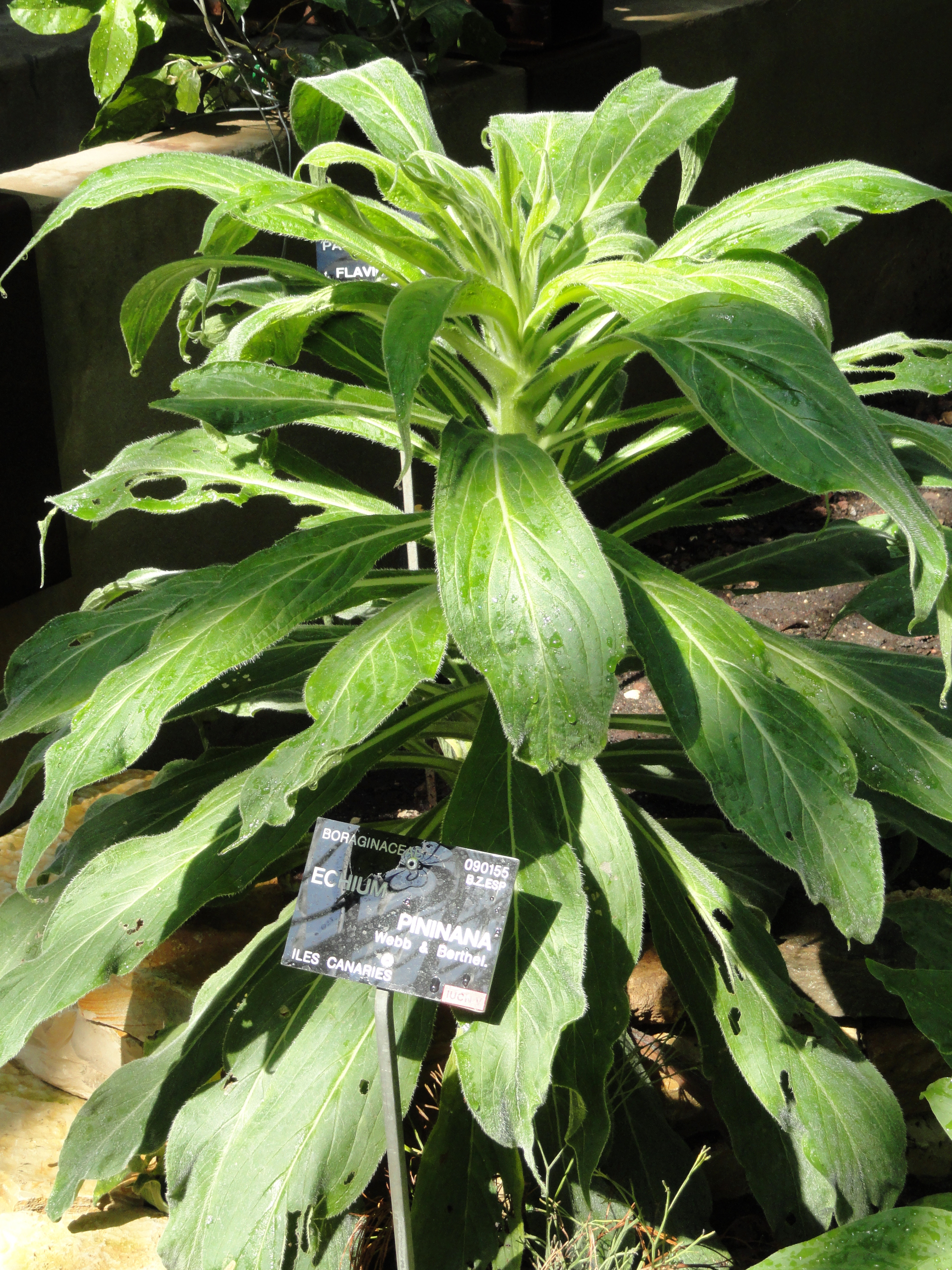 Echium pininana specimen in the Jardin Botanique de Lyon, Parc de la Tête d'Or, Lyon, France.